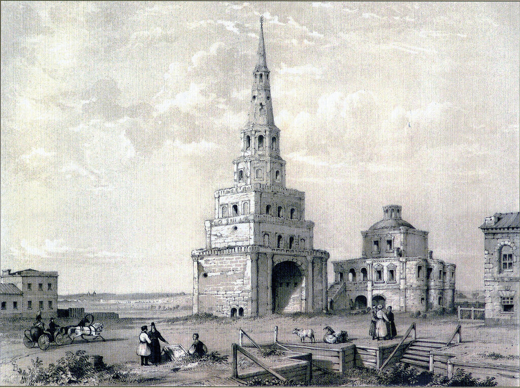 Башня Сююмбеки. Из альбома: Виды Казани, рисованные с натуры Эдвардом Турнерелли. — Лондон, 1839.